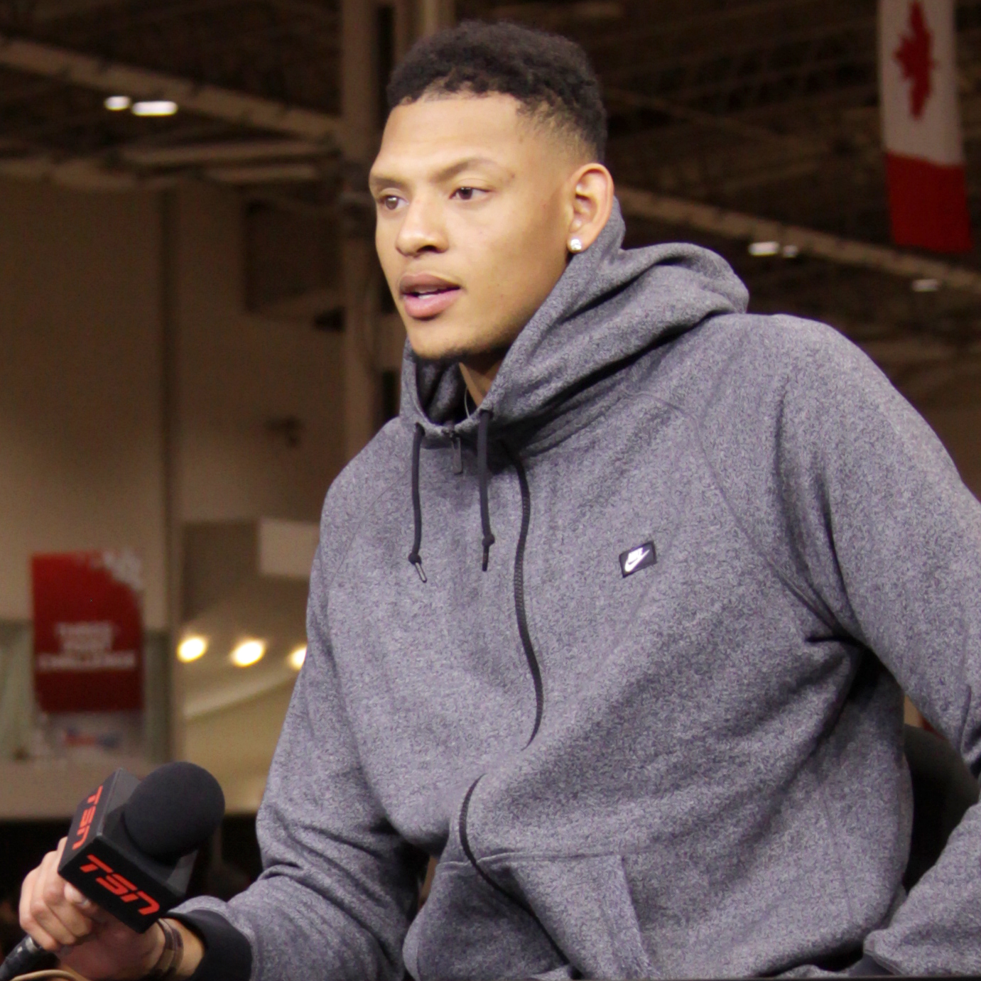 NBA All-Star Weekend 2016